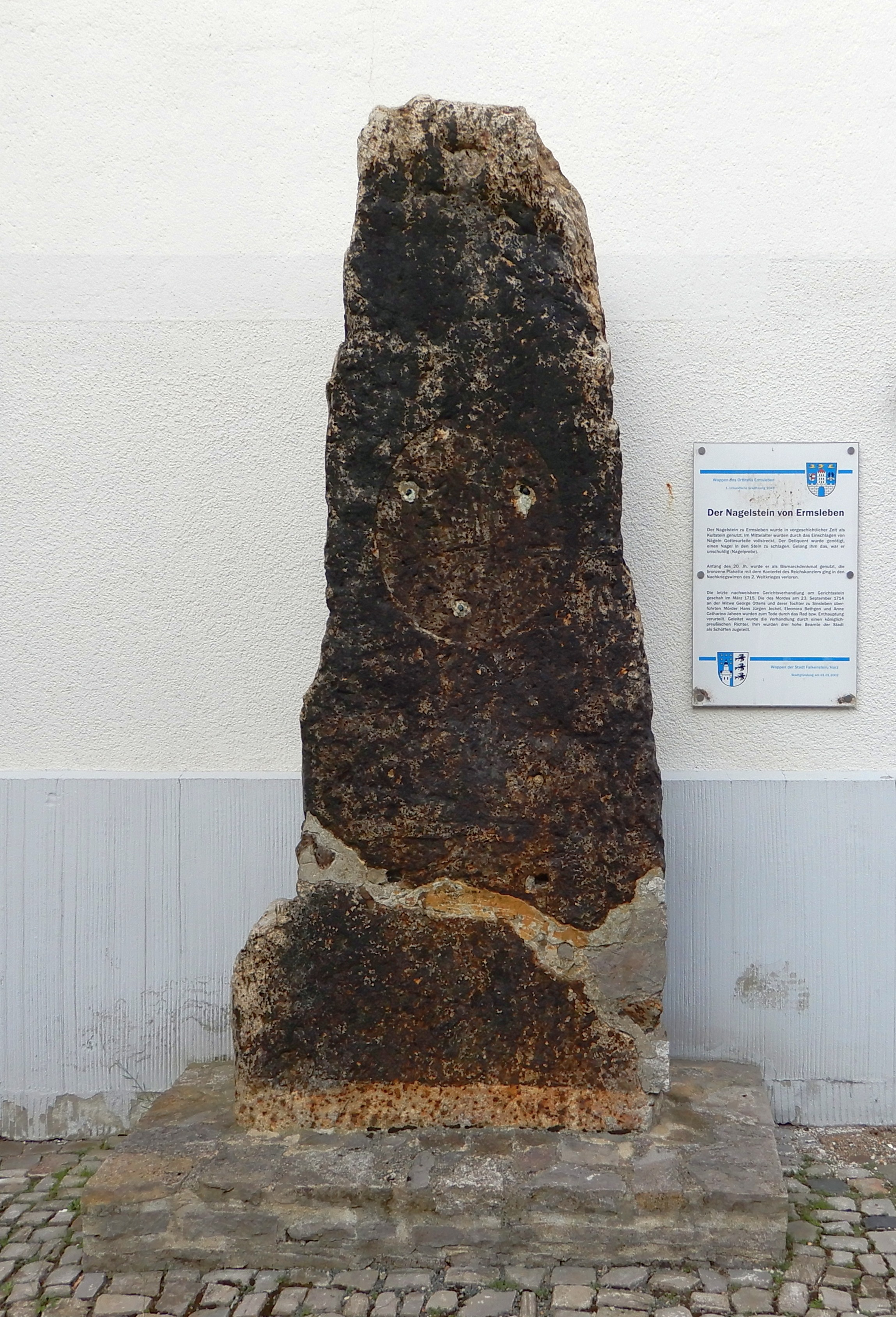 Nagelstein am Markt in Ermsleben